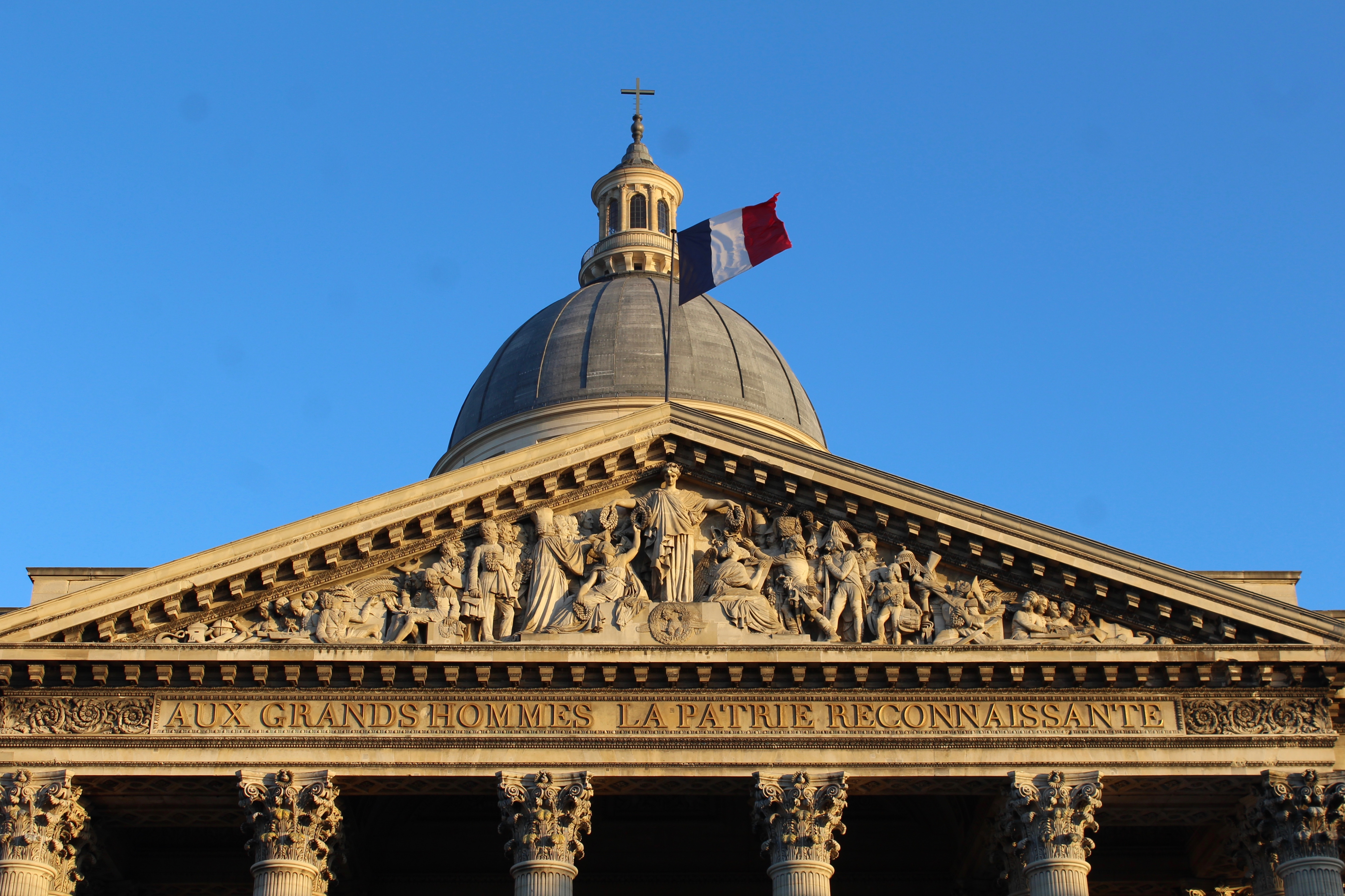 Fronton du Panthéon à Paris.